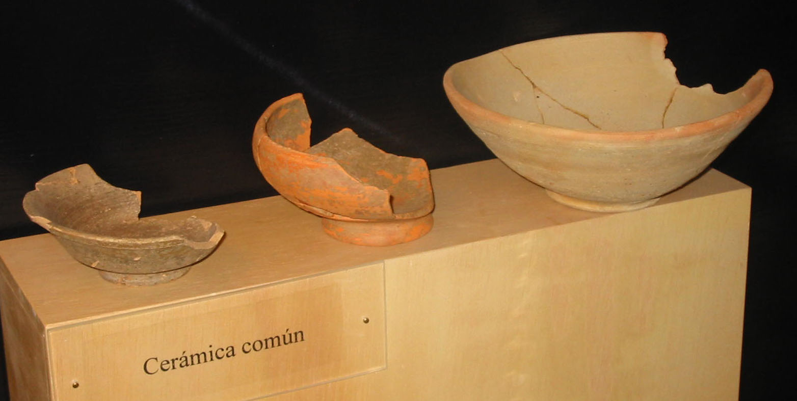 Cerámica común púnico-turdetana, Museo de San Fernando (San Fernando, Cádiz)